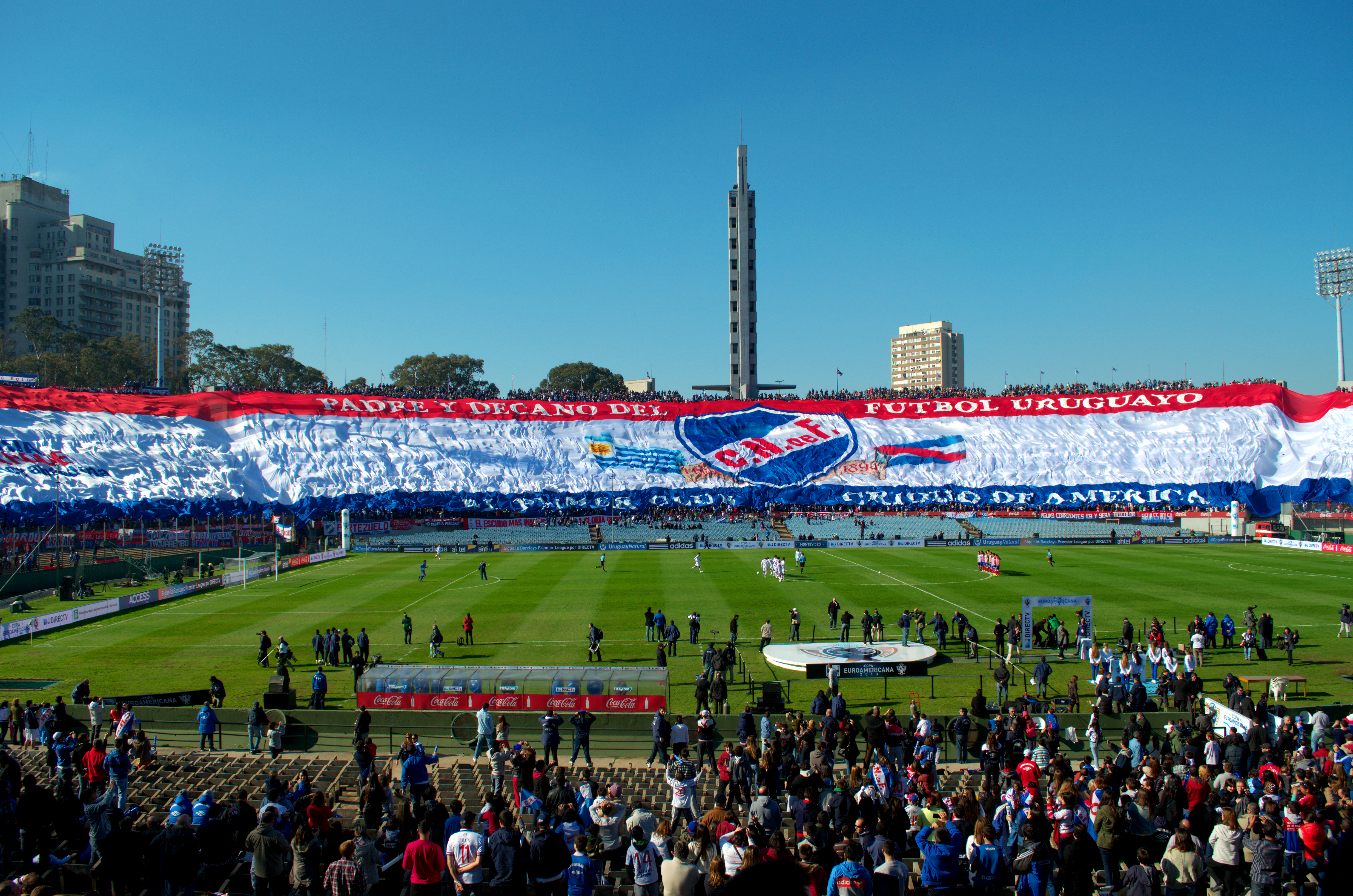 Imagen de la Copa EuroAmericana 2013, entre Nacional y Atlético Madrid